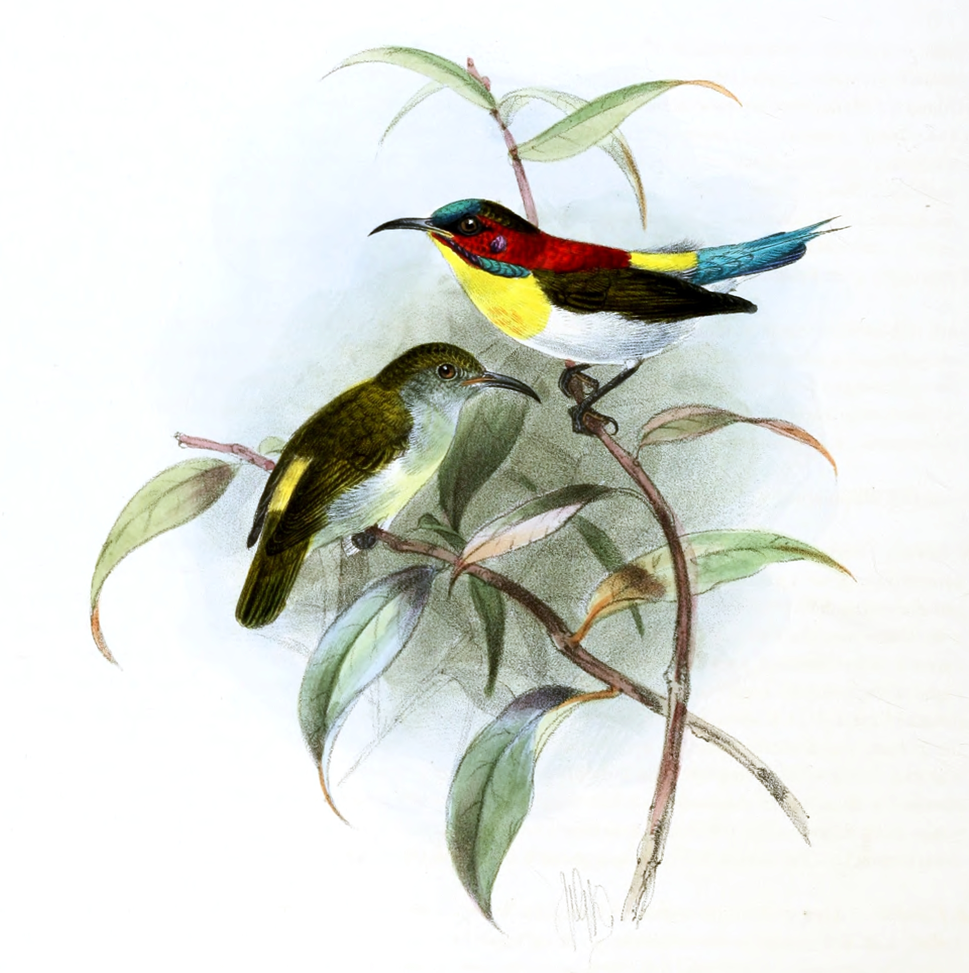 Aethopyga bella